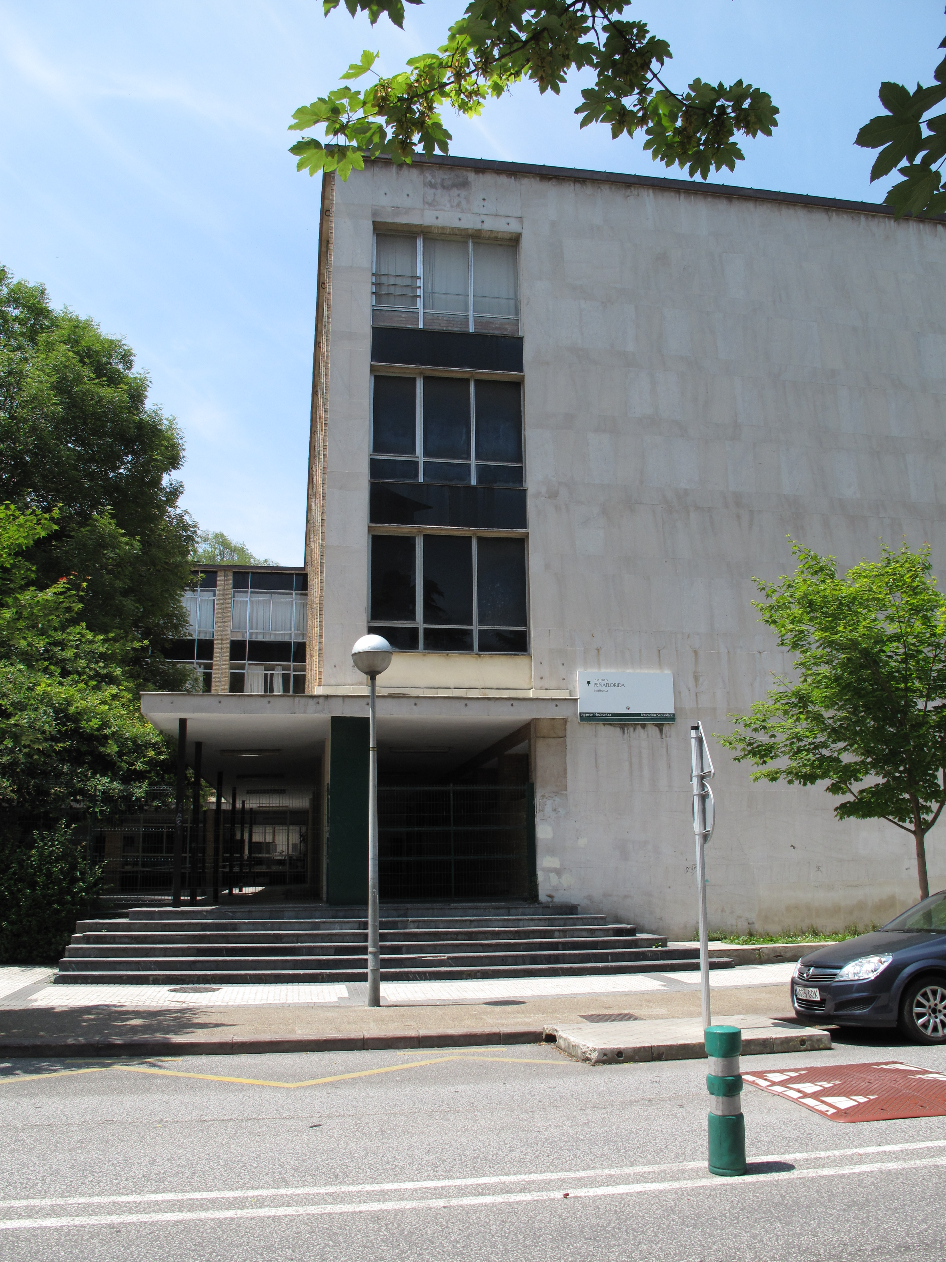 Entrada del antiguo Instituto Peñaflorida en Donostia